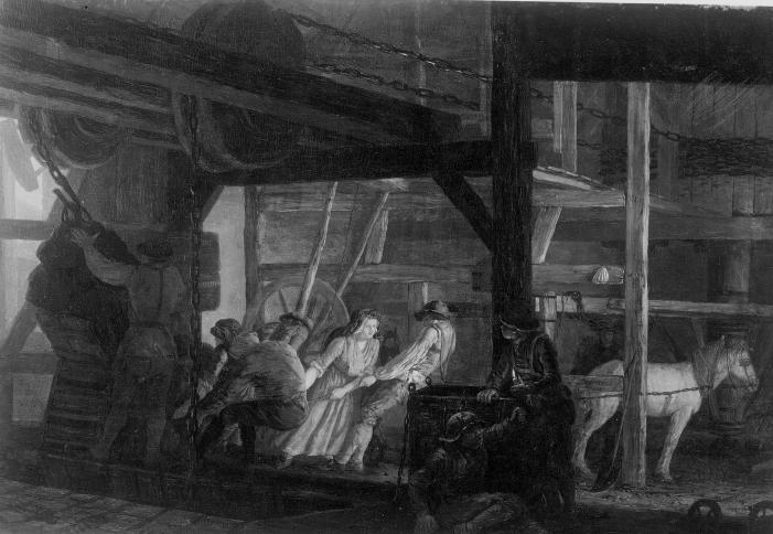 Léonard de France (1735-1805), Houillère. Musée de l’Art Wallon, Liège, inv. n° 21. Huile sur bois, 35,5 cm x 52 cm. Signé vers la droite au tiers inférieur de la hauteur: L. Defrance de Liege.